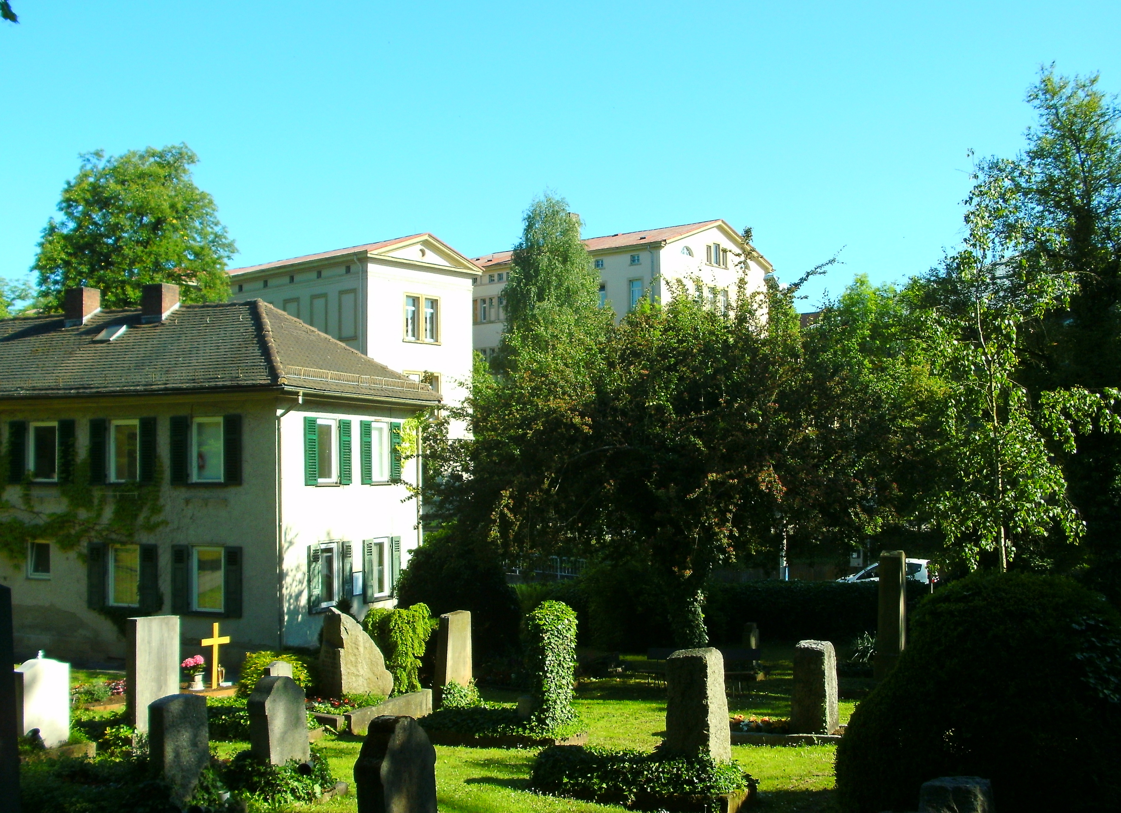 Verwaltung, Gräber Stadtfriedhof in Tübingen, Blick auf Universitätsgebäude